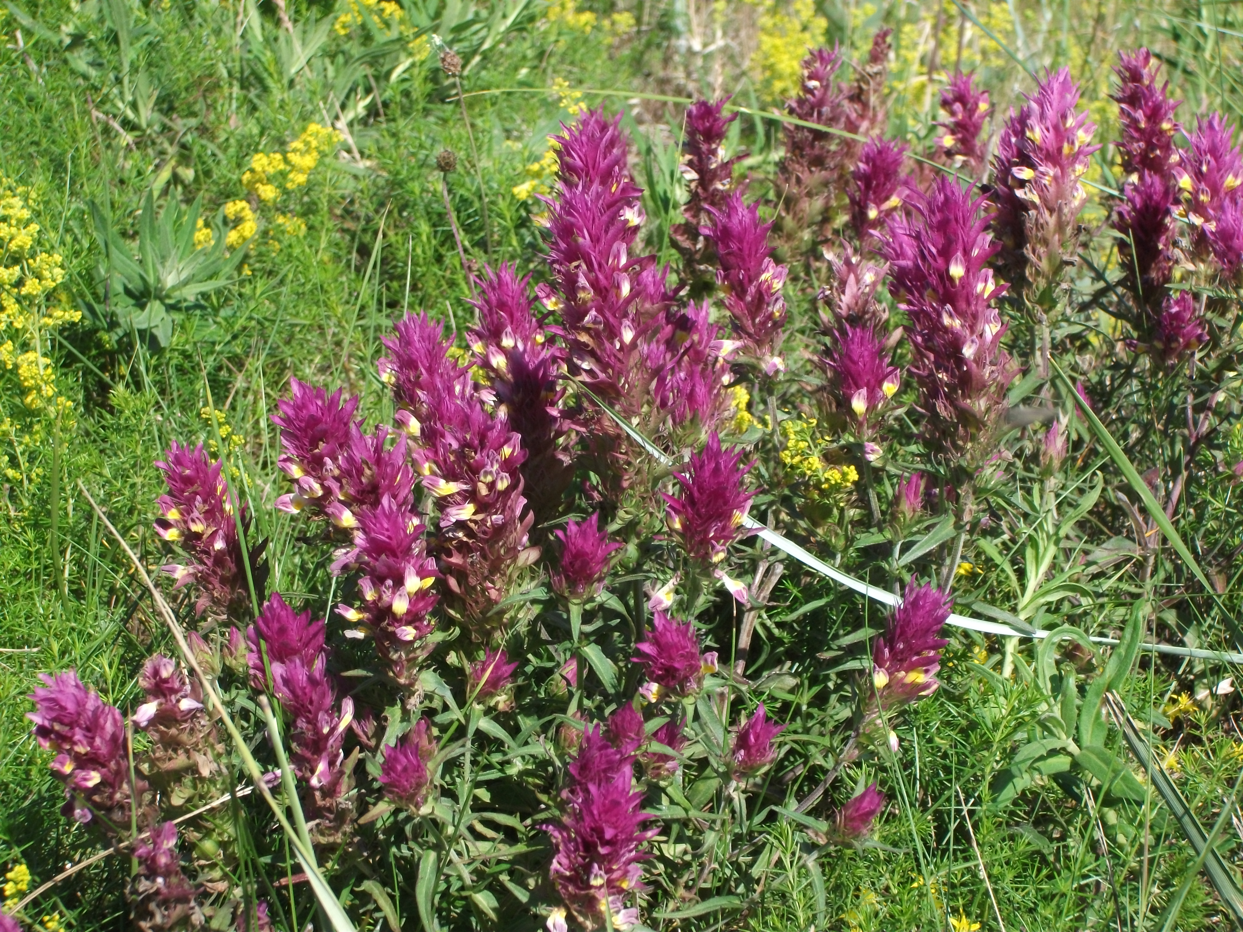 Agerkohvede på diget mellem Bredfjed og Kramnitze på LollandUnknown melampyrum pratense